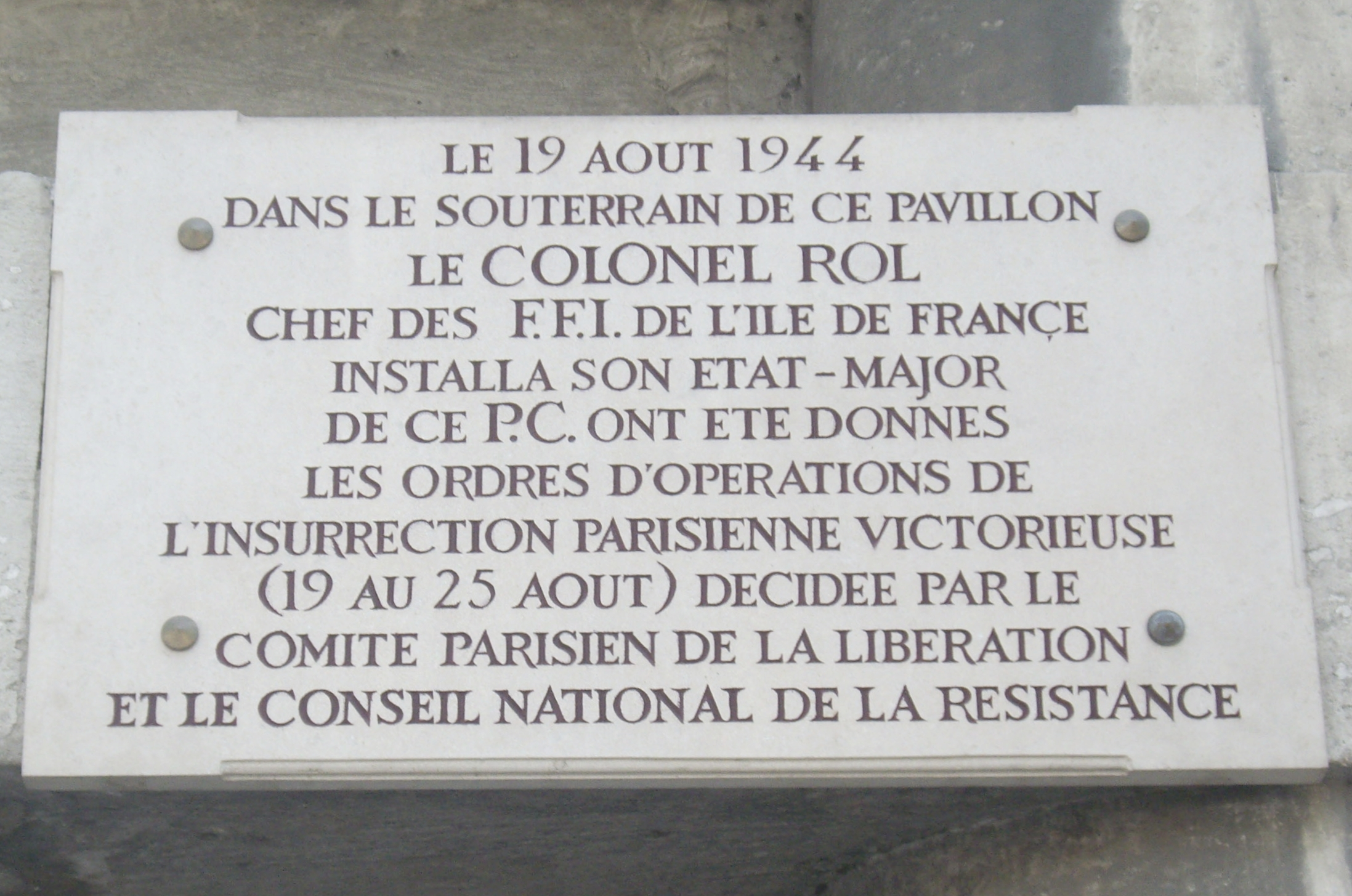 Plaque commémorative, 4 avenue du Colonel-Henri-Rol-Tanguy, Paris 14e. « Le 19 août 1944, dans le souterrain de ce pavillon, le colonel Rol, chef des FFI de l'Île-de-France, installa son état-major. De ce PC ont été donnés les ordres d'opérations de l'insurrection parisienne victorieuse (19 au 25 août) décidée par le Comité parisien de la Libération et le Conseil national de la Résistance. »